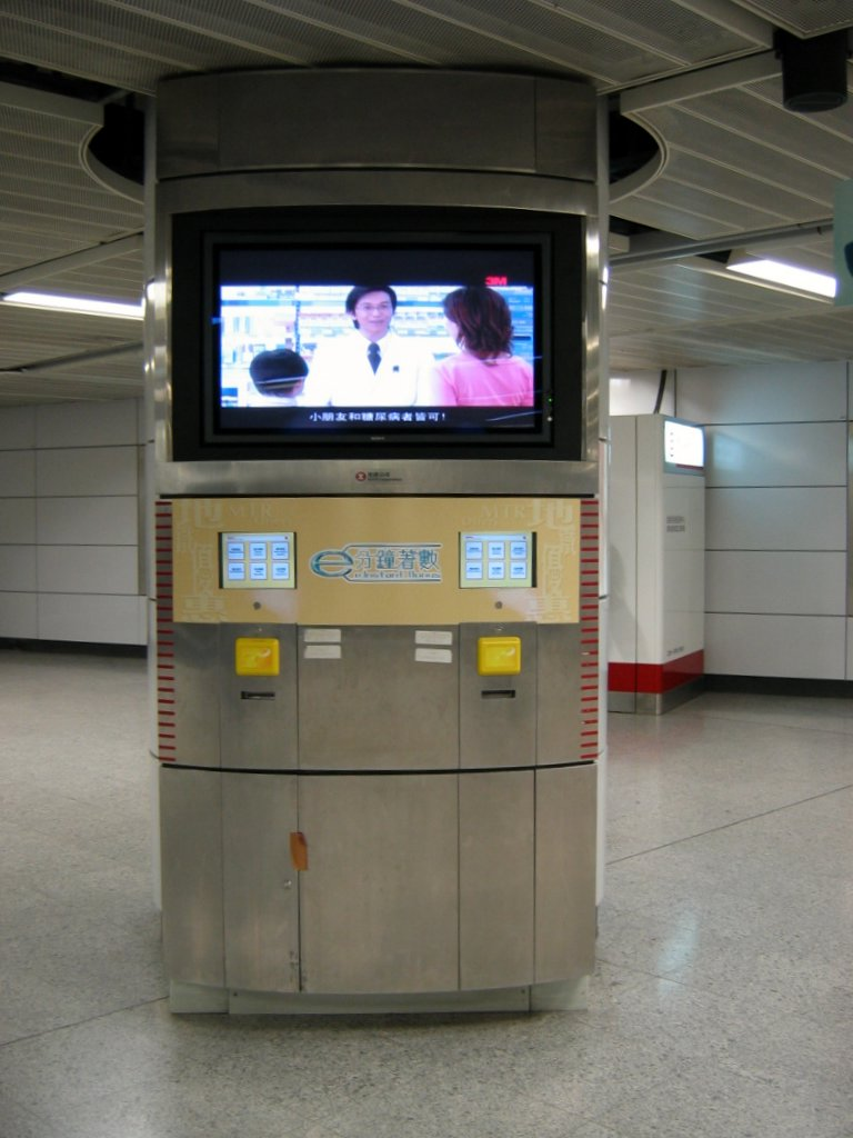 e分鐘著數機